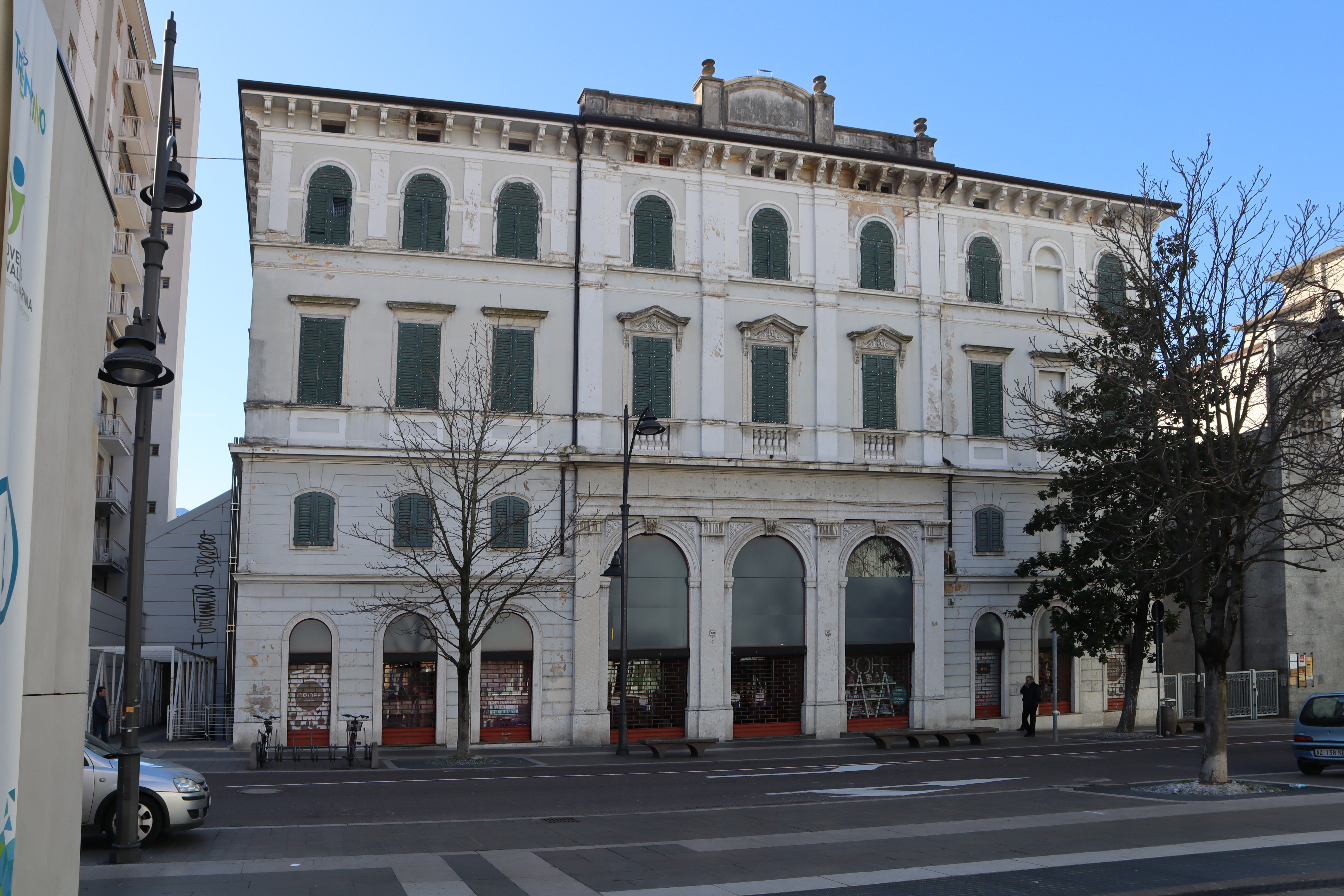 Ex albergo Vittoria, ora UPIM